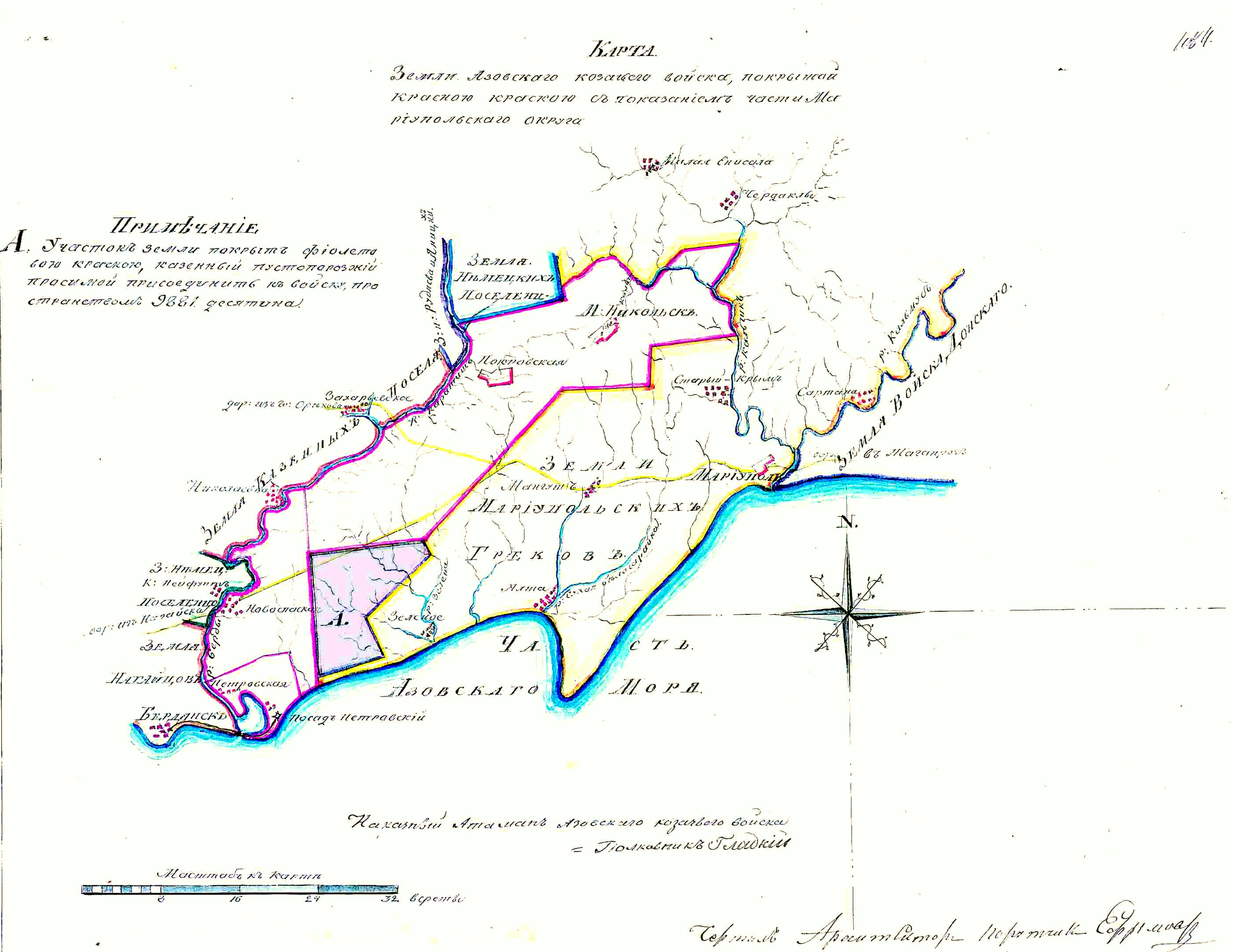 Карта земель Азовского козачьего войска с показанием части Мариупольского округа, составленная в 1839 году Наказным Атаманом Азовского козачьего войска полковником О. М. Гладким